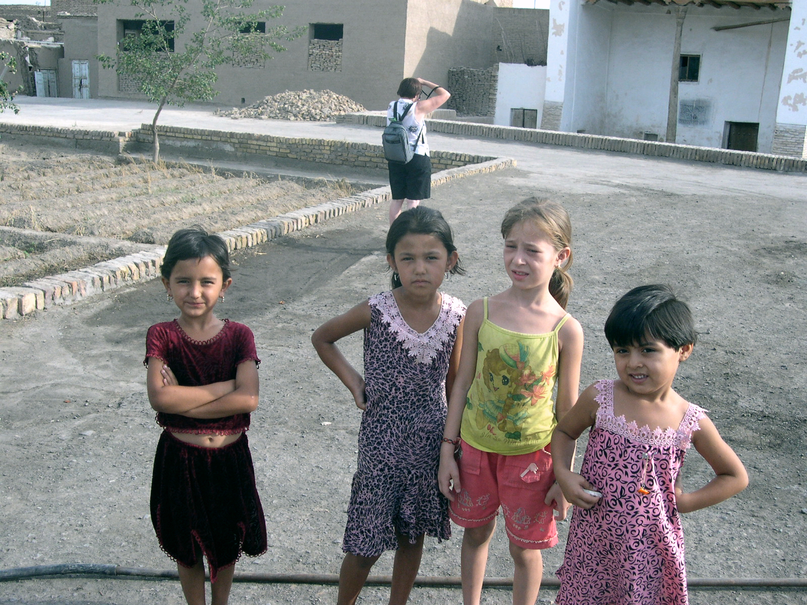 Enfants ouzbèques dans une rue de Khiva (Ouzbékistan)